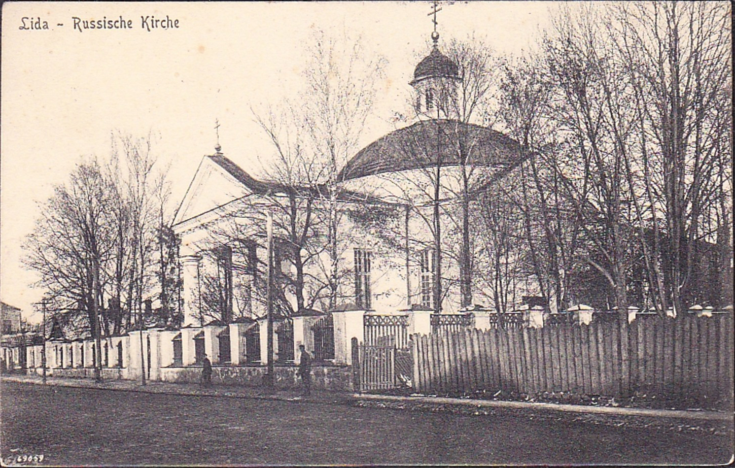 Беларуская (тарашкевіца): Ліда (Lida), рог вуліц Віленскай (vulica Vilenskaja) і Школьнай (vulica Školnaja). Касьцёл Сьвятога Язэпа і кляштар піяраў